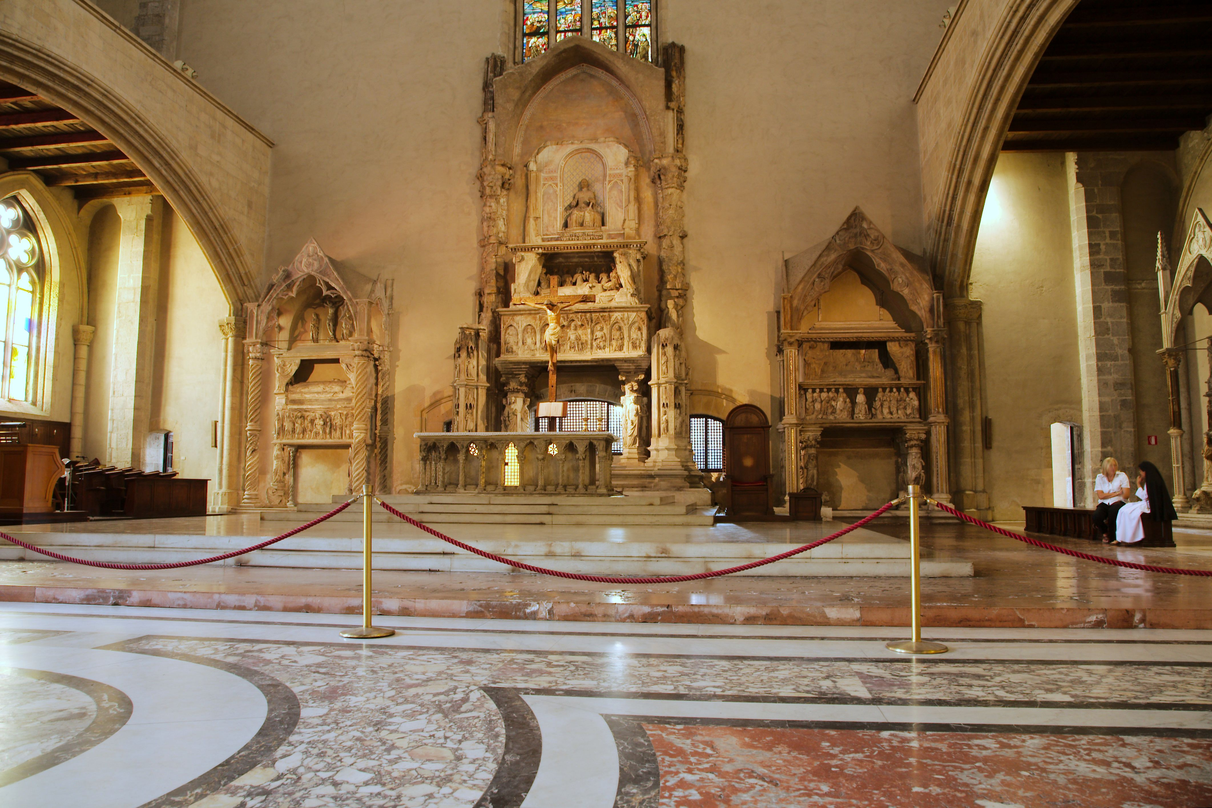 Santa Chiara (Naples) - inside